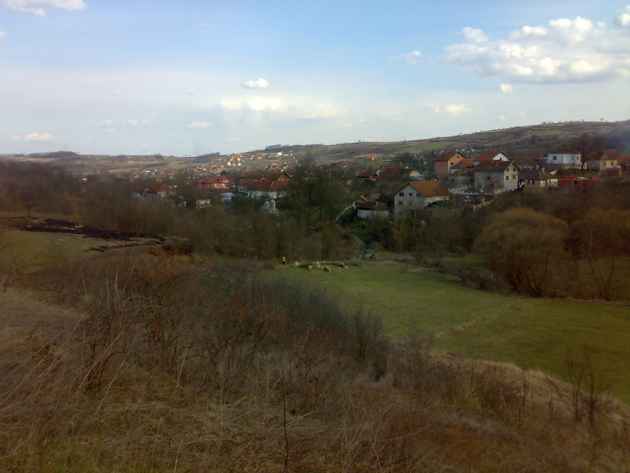 Aca Todorović Šašilovac